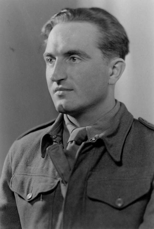 Jacek Janusz Wyszogrodzki "Janusz" - dowódca Batalionu "Oaza" i Pułku "Waligóra" w powstaniu warszawskim